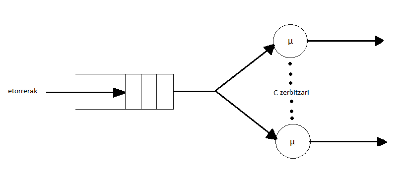 The M/M/C queuing system.